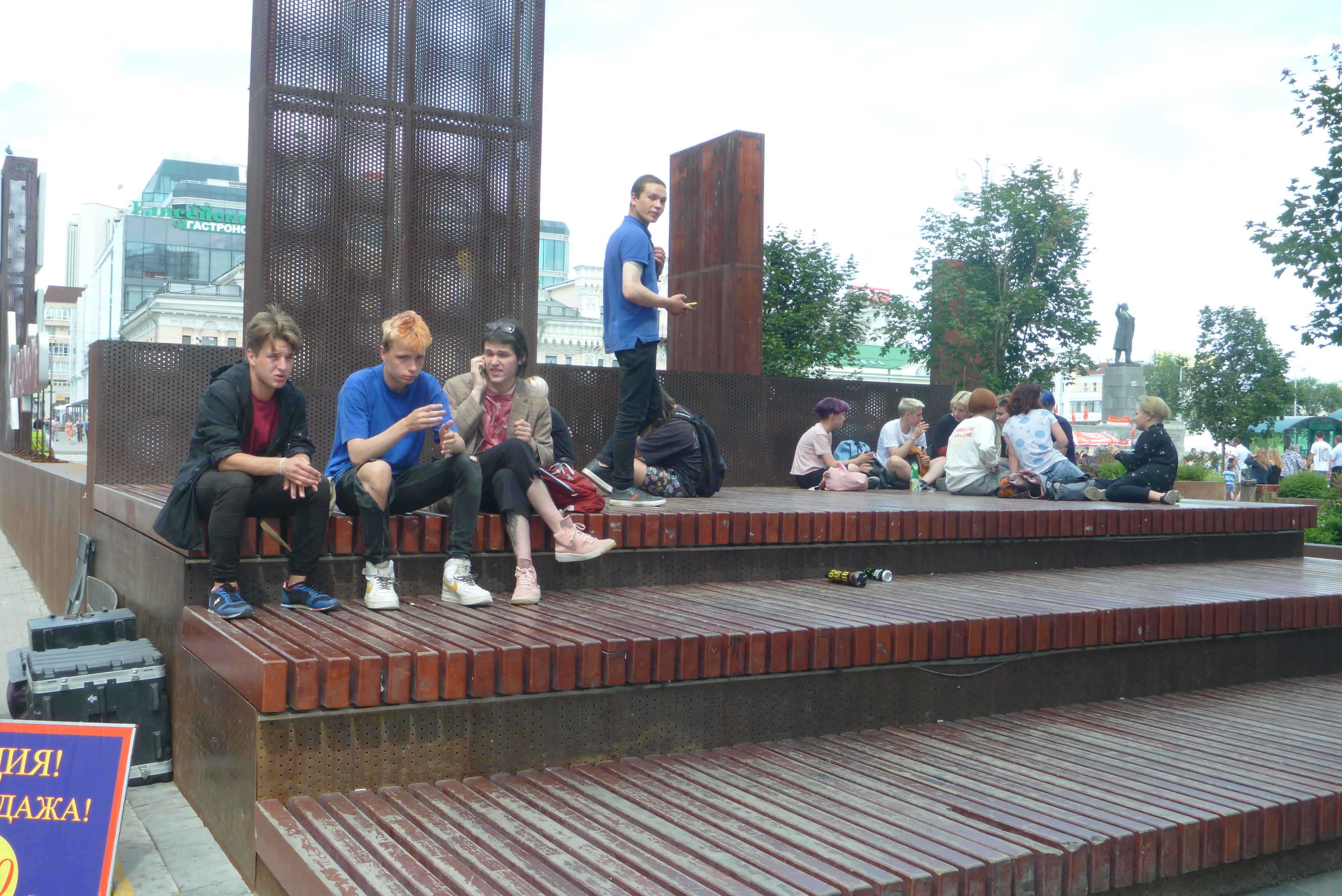 Подростки на площади 1905 года в Екатеринбурге 13 июля 2019 года